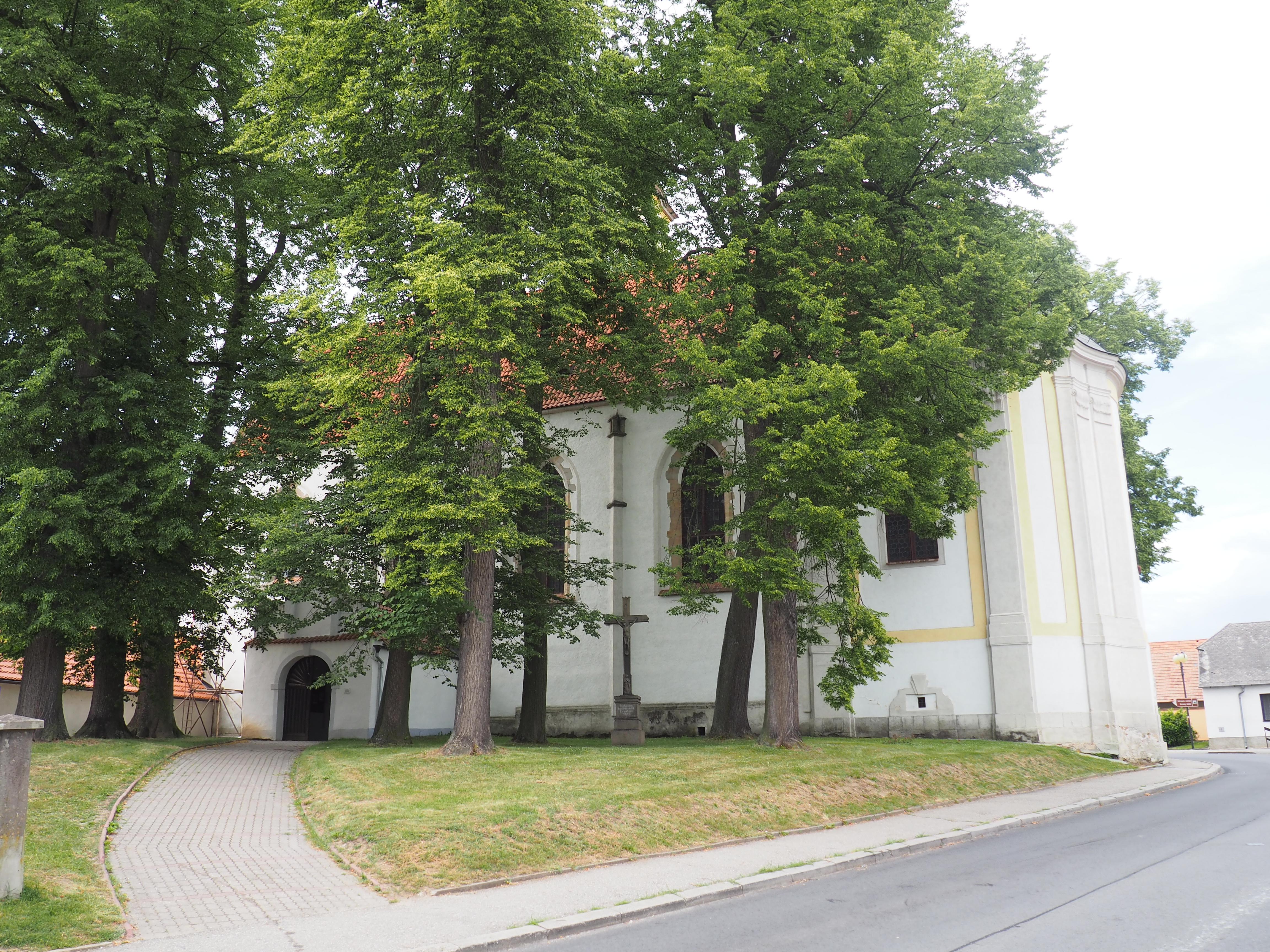 fotka z exteriéru